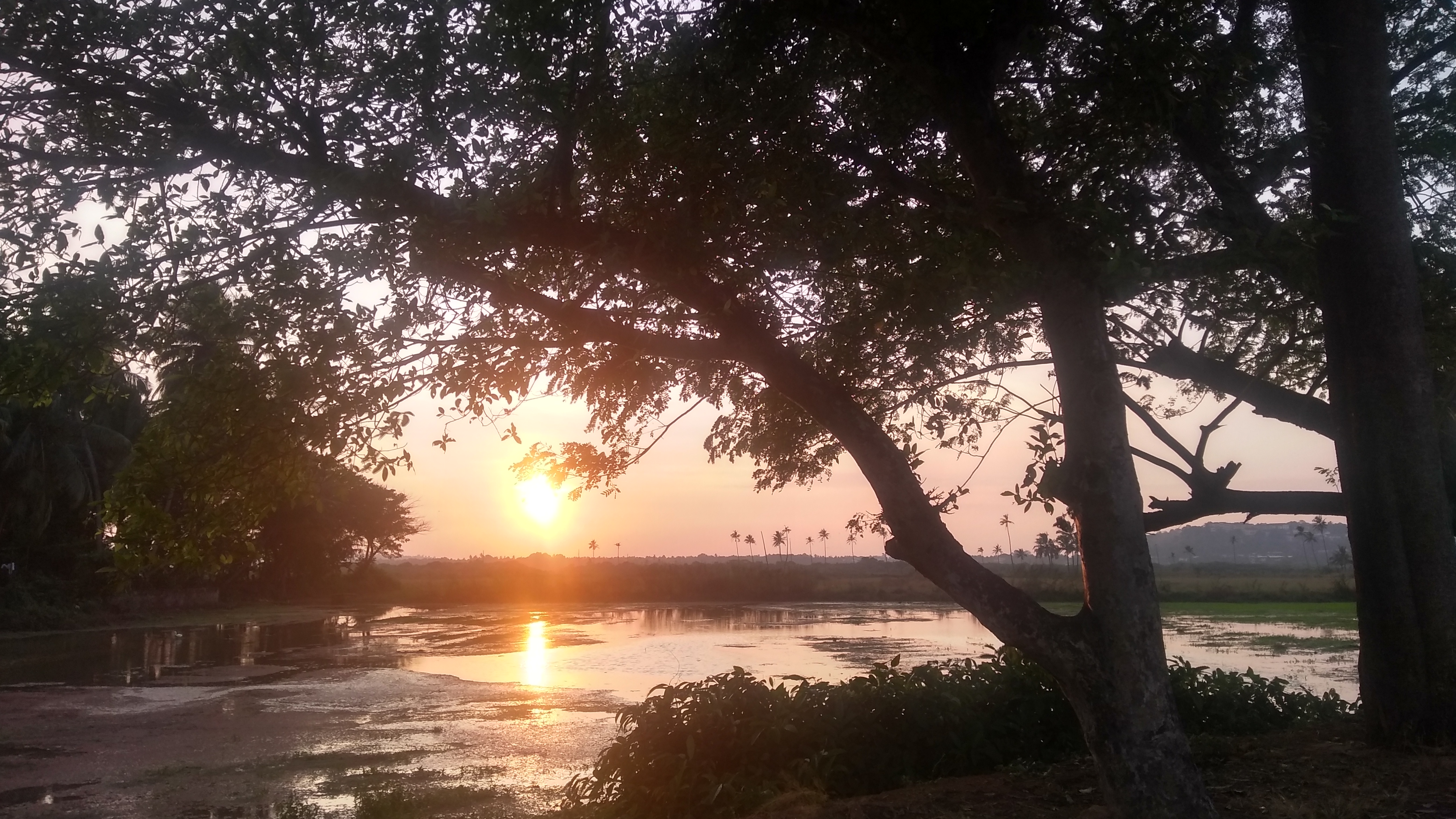 December 2017